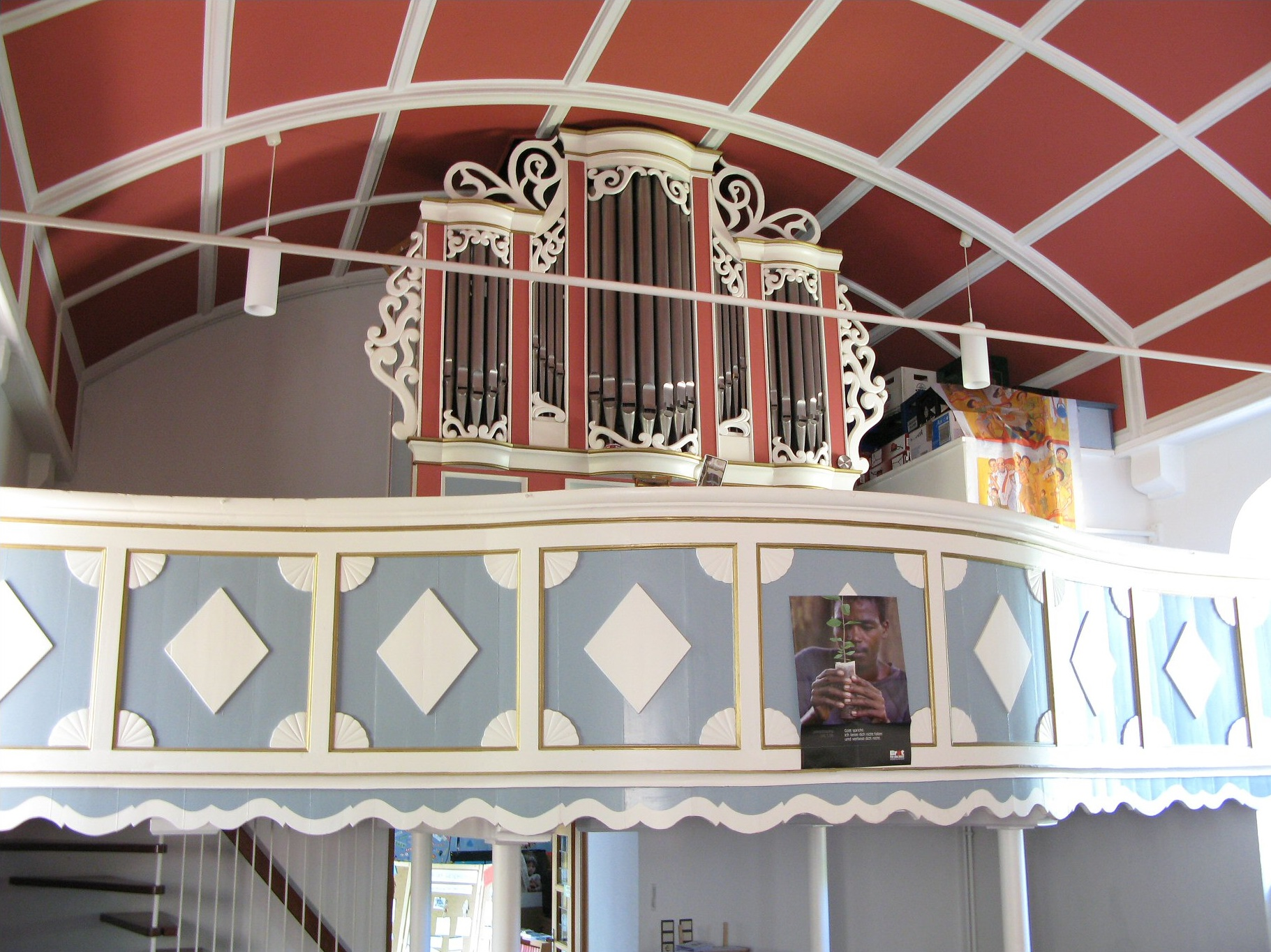 Orgel in Großwolde, Landkreis Leer